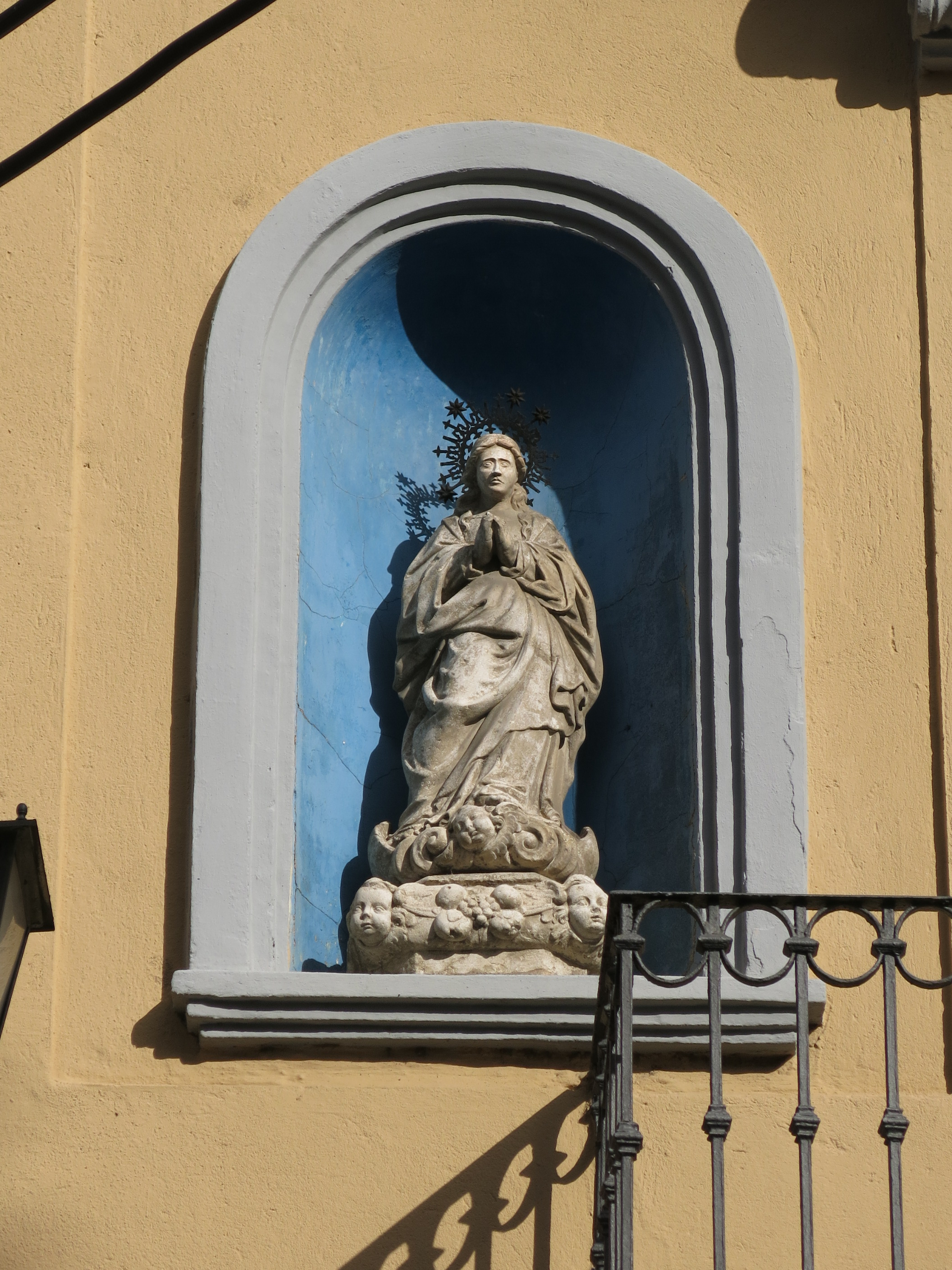 Fornícules i imatges religioses (Manlleu)